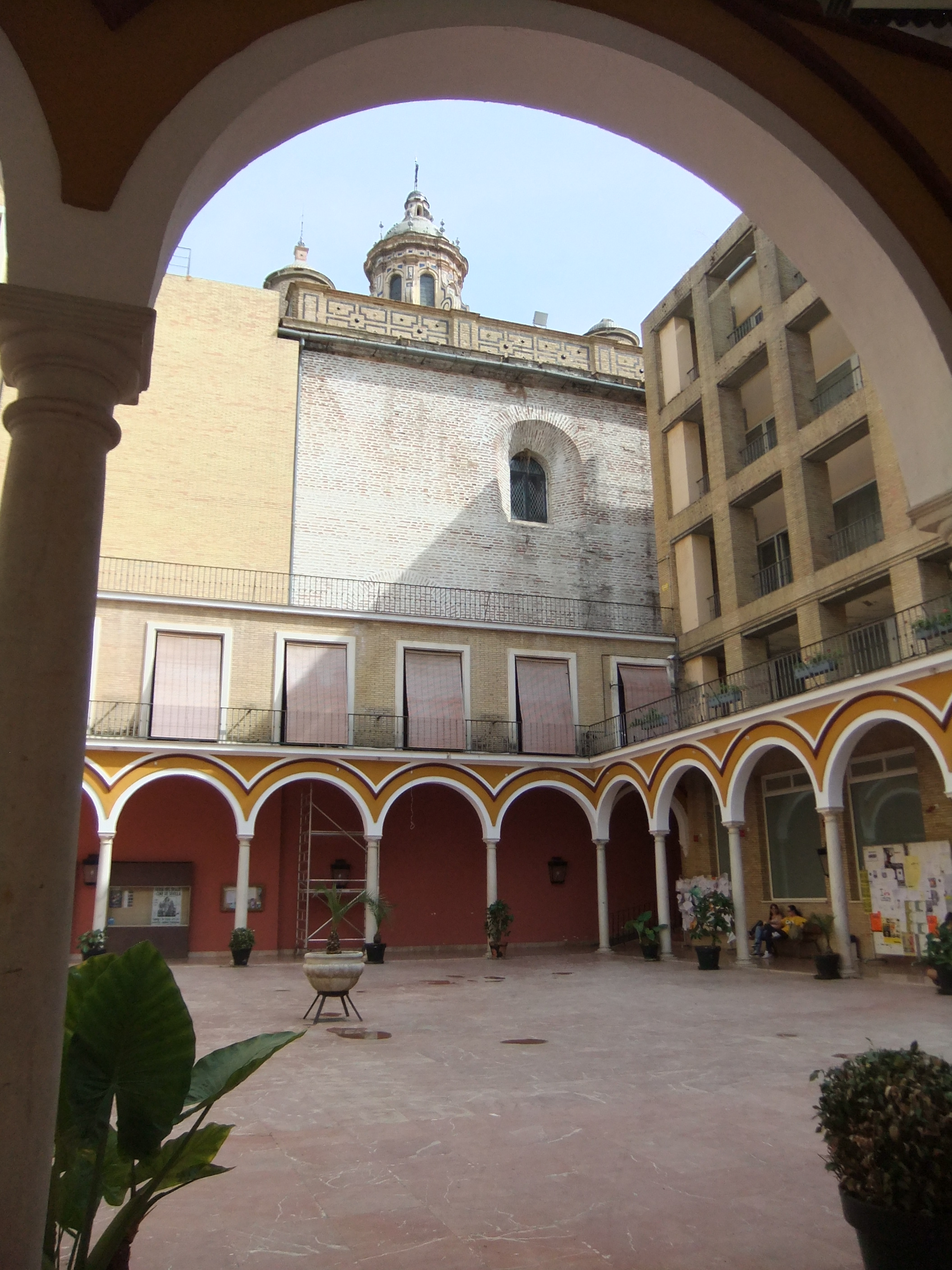 Patio de la actual Facultad de Bellas Artes de Sevilla. Su ubicación y columnas son las mismas de la antigua Casa Profesa de los jesuitas que sirvió de sede a la Universidad Hispalense. Al fondo, muro del crucero de la epístola de la Iglesia de la Anunciación, capilla de la vieja Universidad.